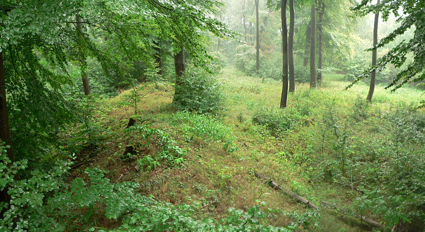 Wallkrone der Barenburg